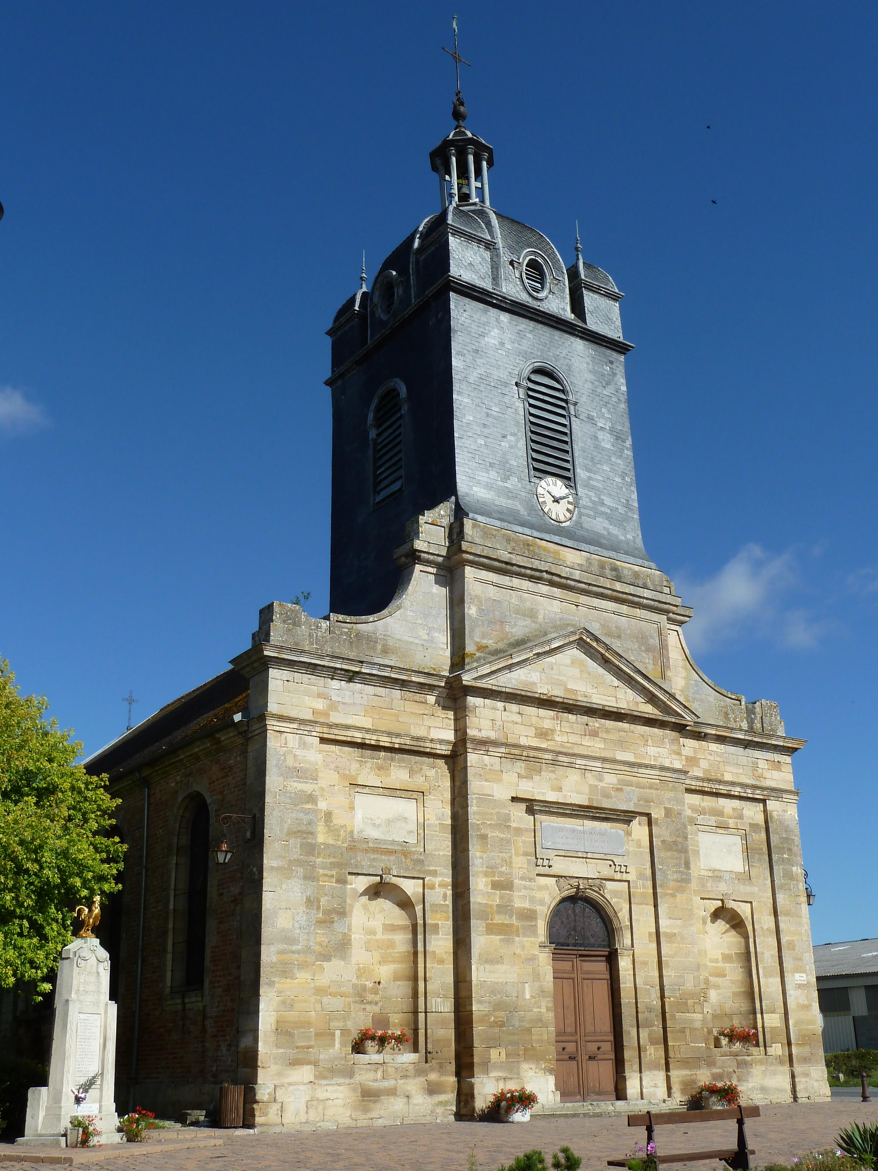 Saint-Mard-sur-le-Mont - Eglise dédiée à saint Médard, construite de 1774 à 1777 sur les plans de François Lefebvre architecte à Reims. La façade est surmontée d'une tour clocher charpentée, sommée d'un clocheton.